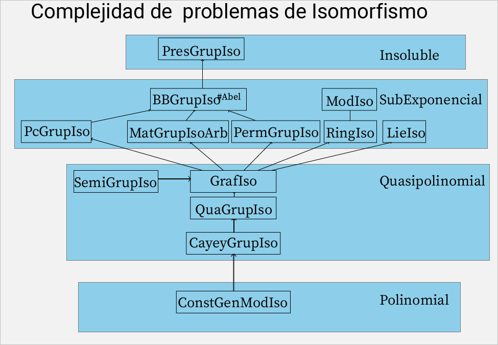 En terminos de complejidad